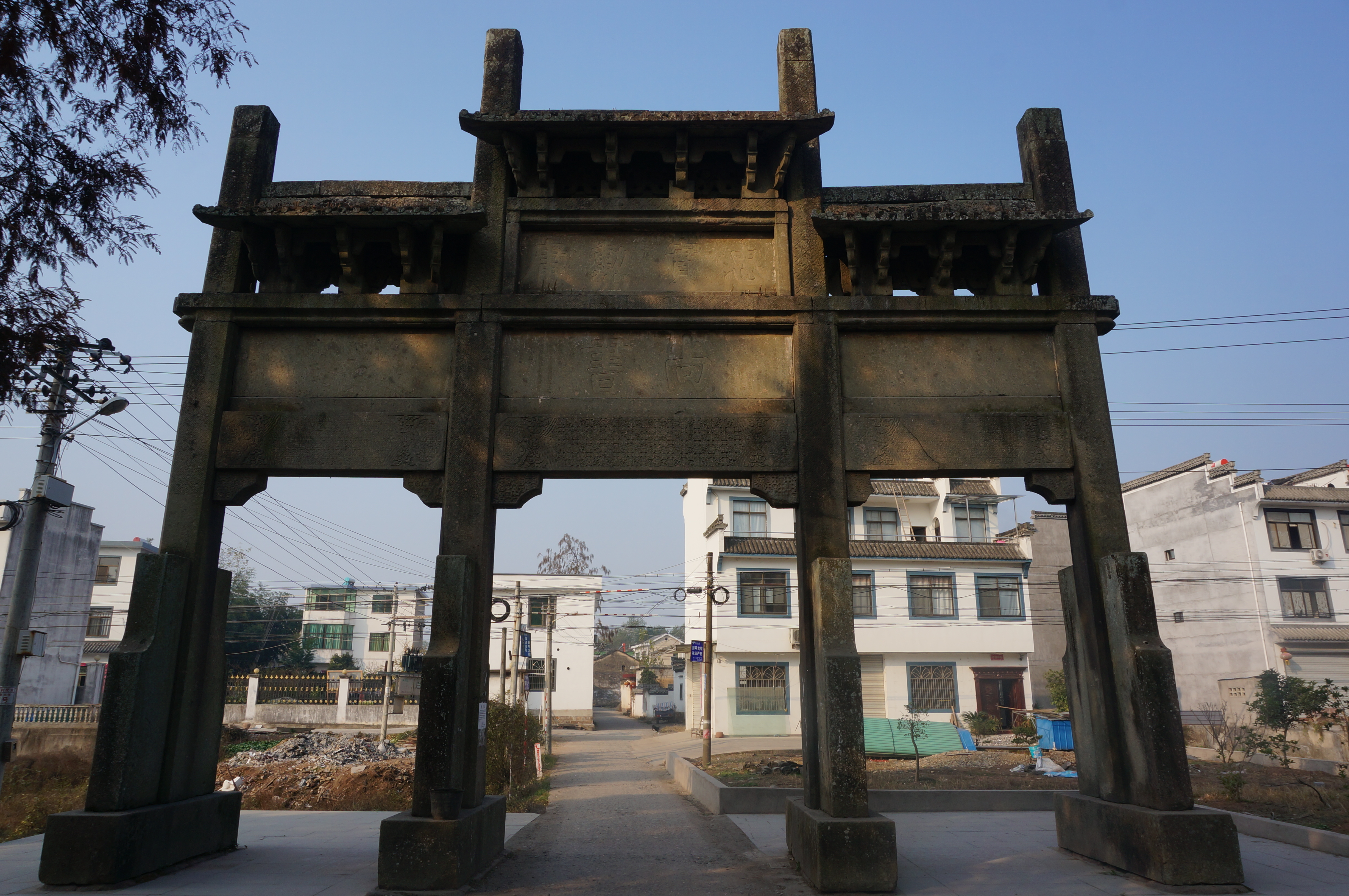 歙县殷尚书坊，东面。